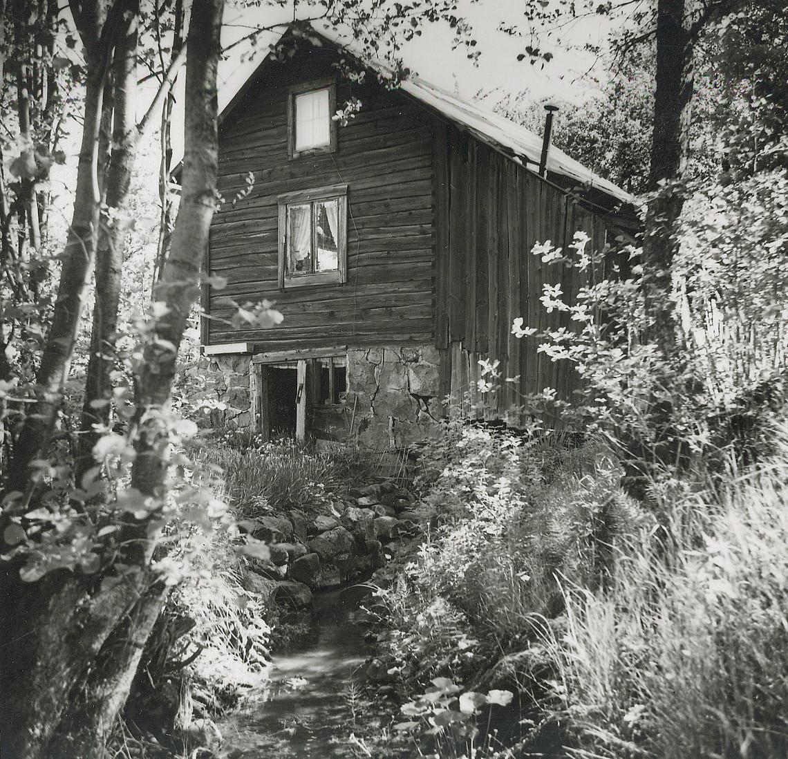 Sätra kvarn från väster